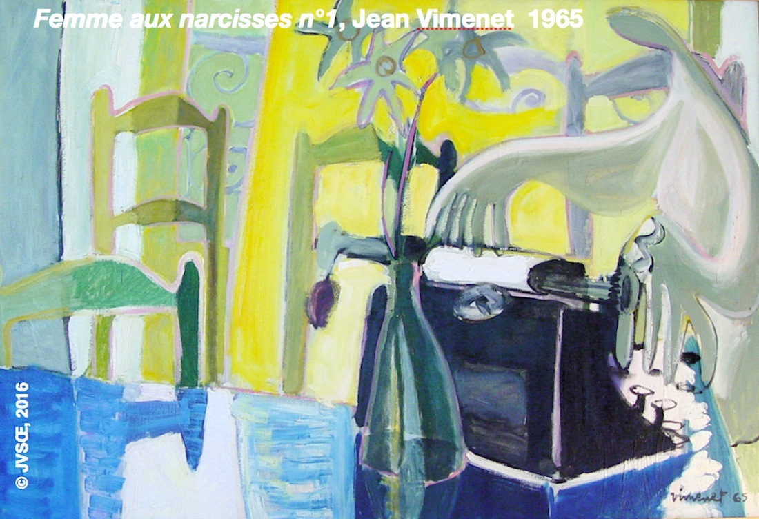 Premier timbre émis sur l'œuvre de Jean Vimenet. Dame aux narcisses n°1 fait partie de la série "Femmes à la machine". Huile sur toile, Cachan, 1965